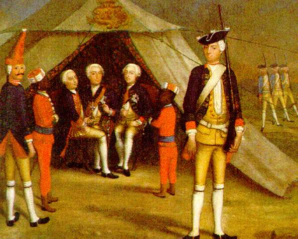 Drei Prinzen im Feldlager